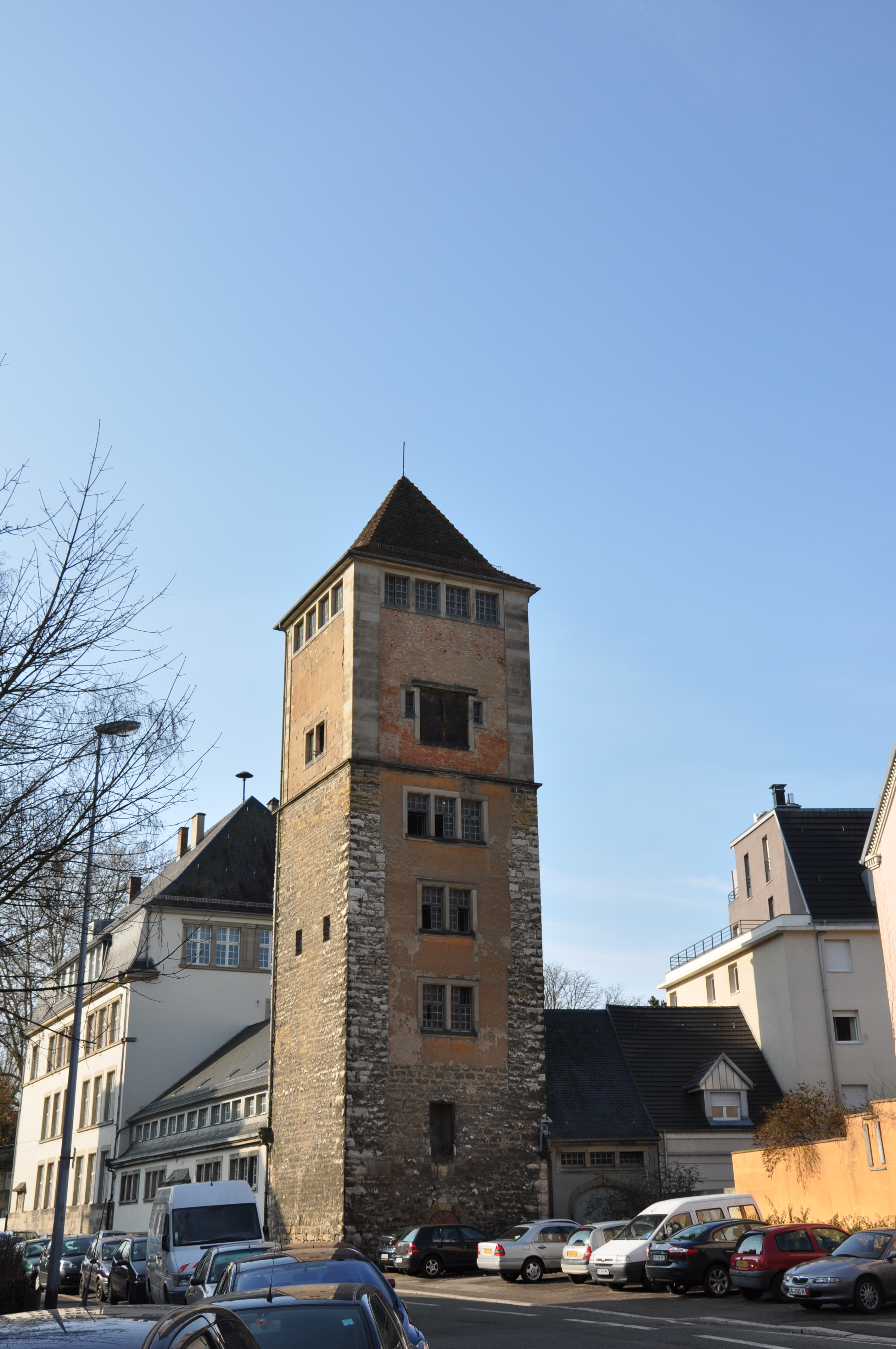 La Tour du Diable, Mulhouse, France.